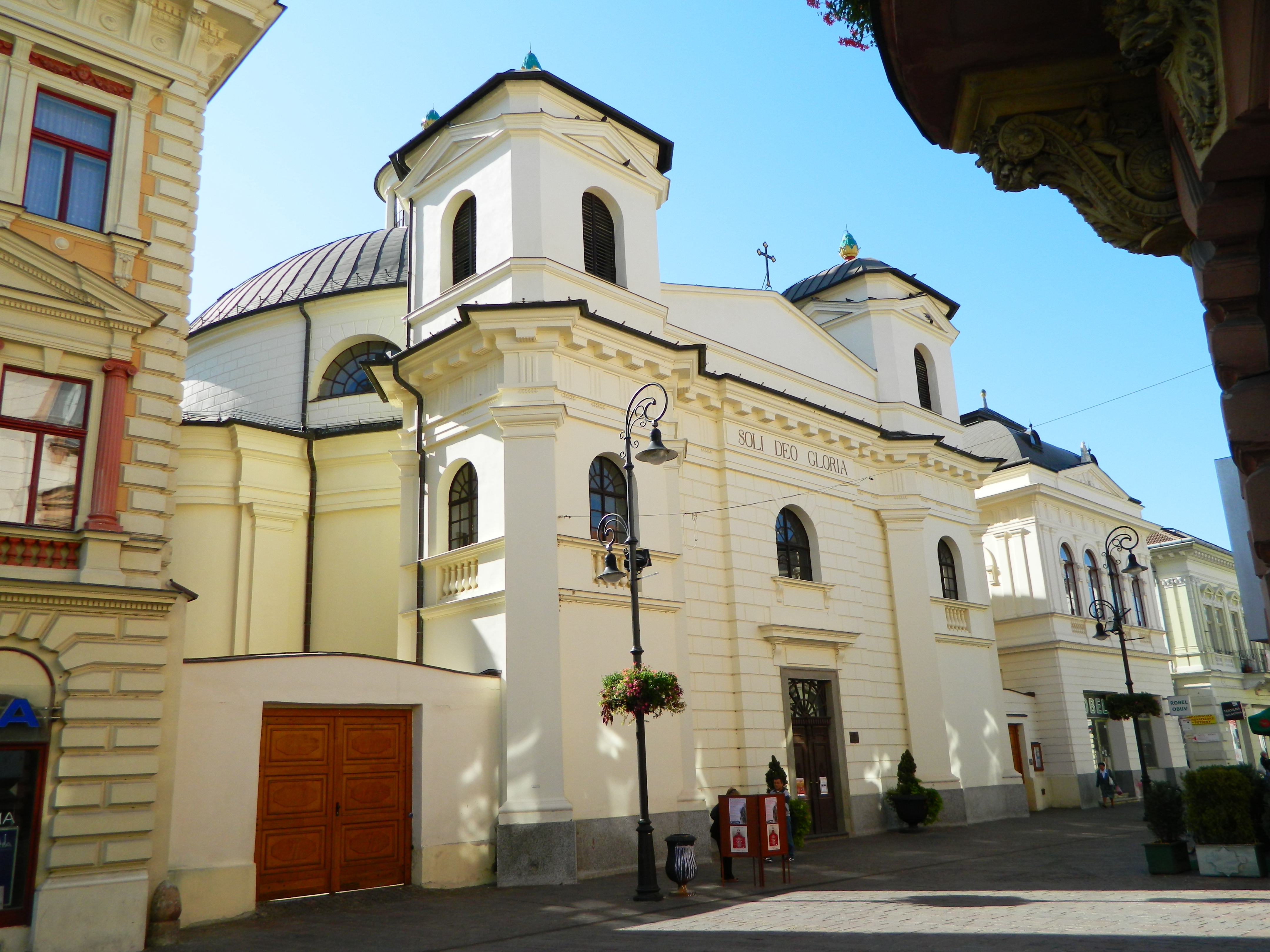 Evanjelický kostol v Košiciach na Mlynskej 23